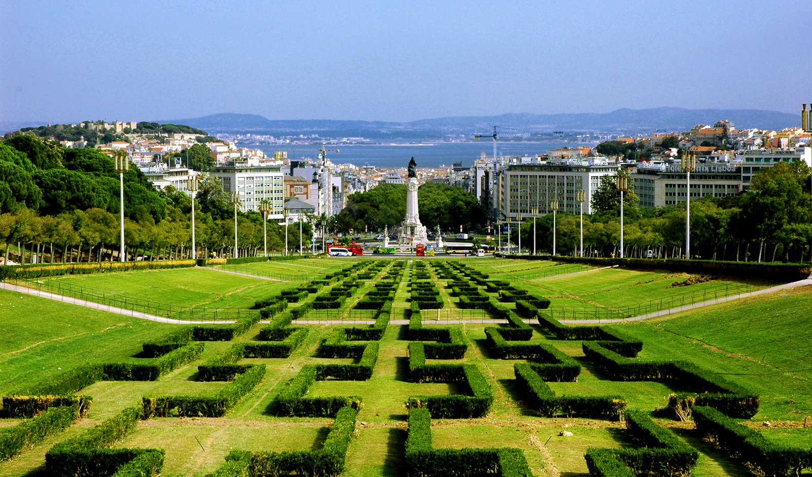 Park Eduardo VII, Lisbon